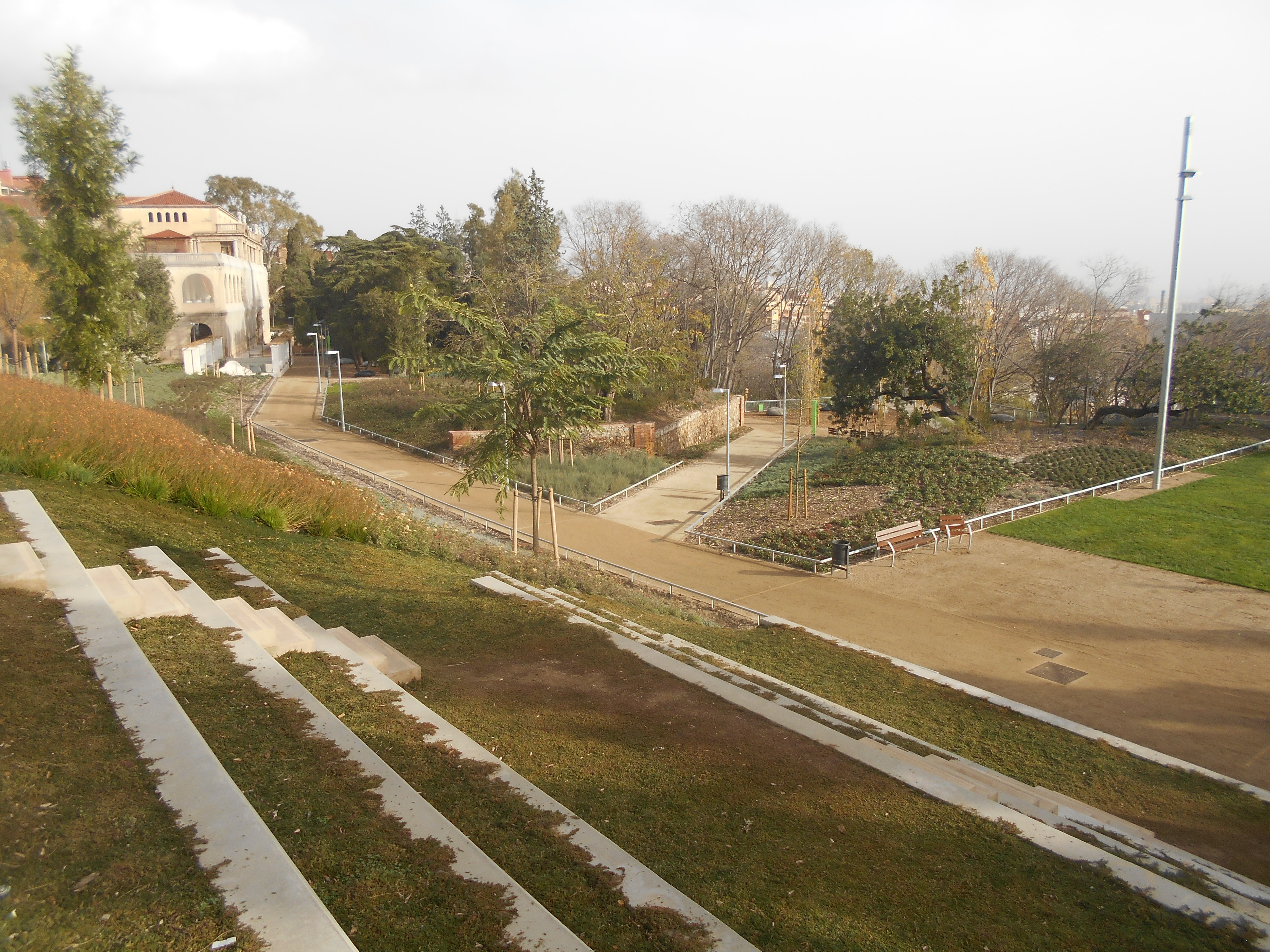 Jardines del Doctor Pla i Armengol